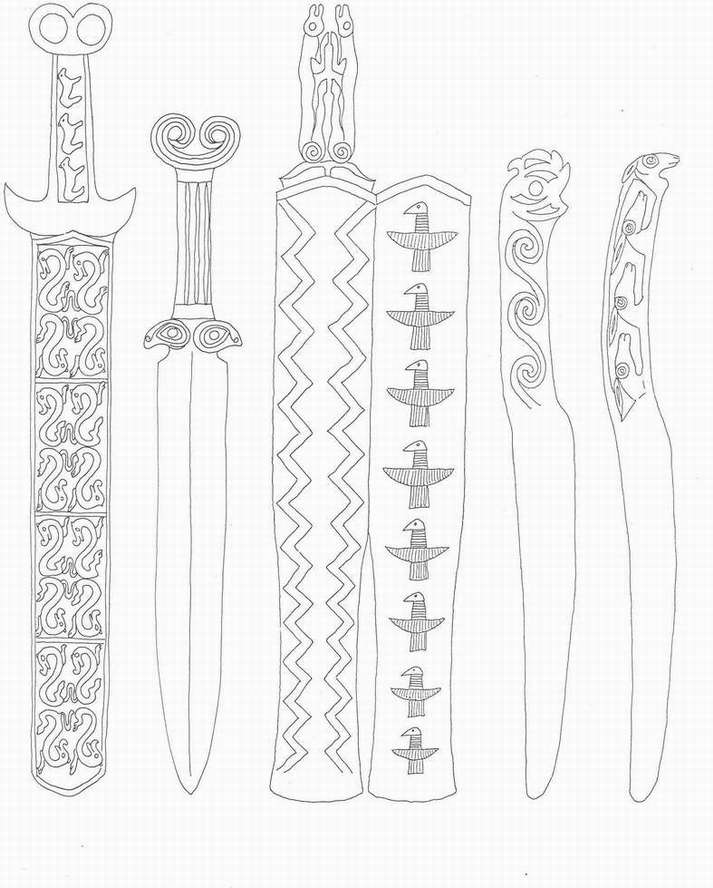 Hun tőrök a tokiói nemzeti múzeumban, rajz